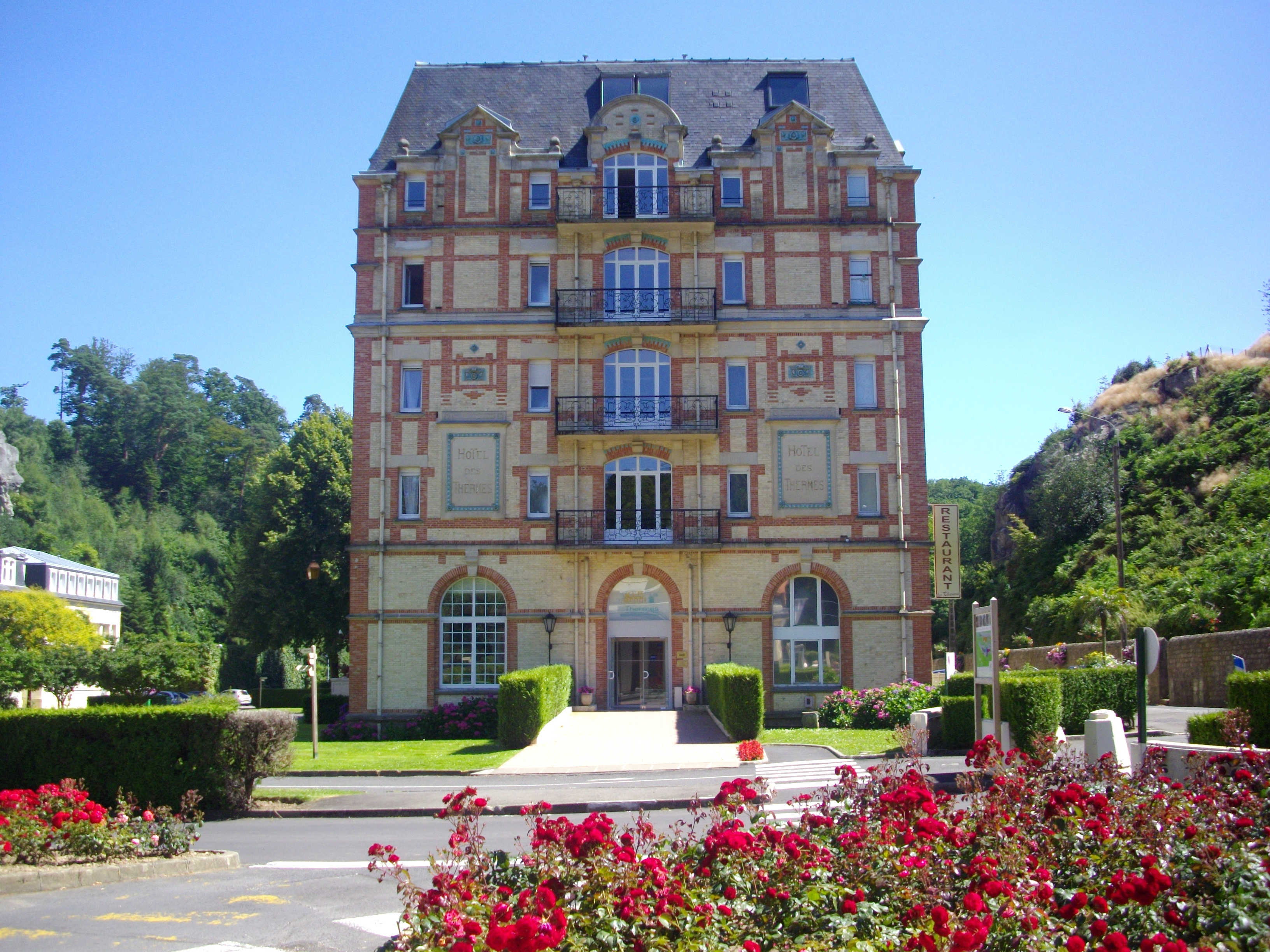 Hôtel des Thermes de Bagnoles-de-l'Orne, Bagnoles-de-l'Orne (Basse-Normandie, France)